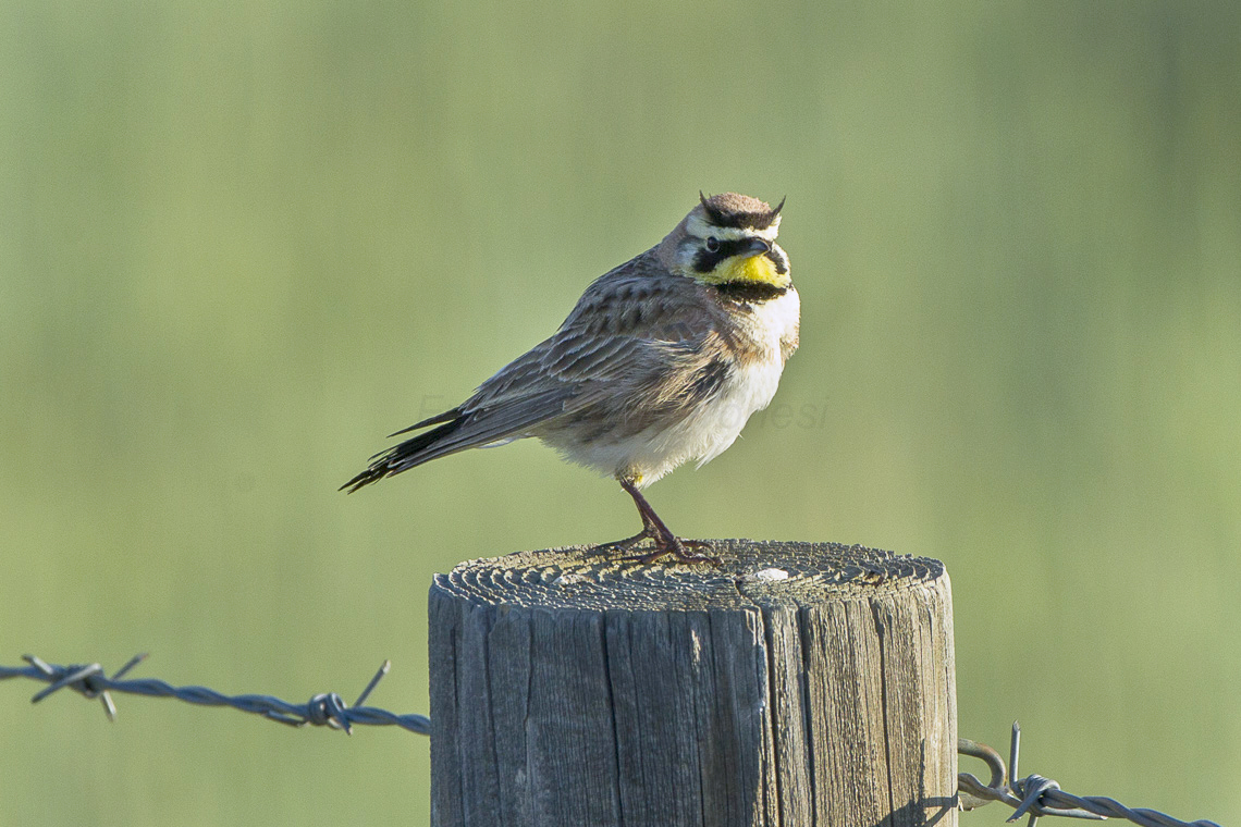 Horned Lark - Sisters - Oregon_S4E7392